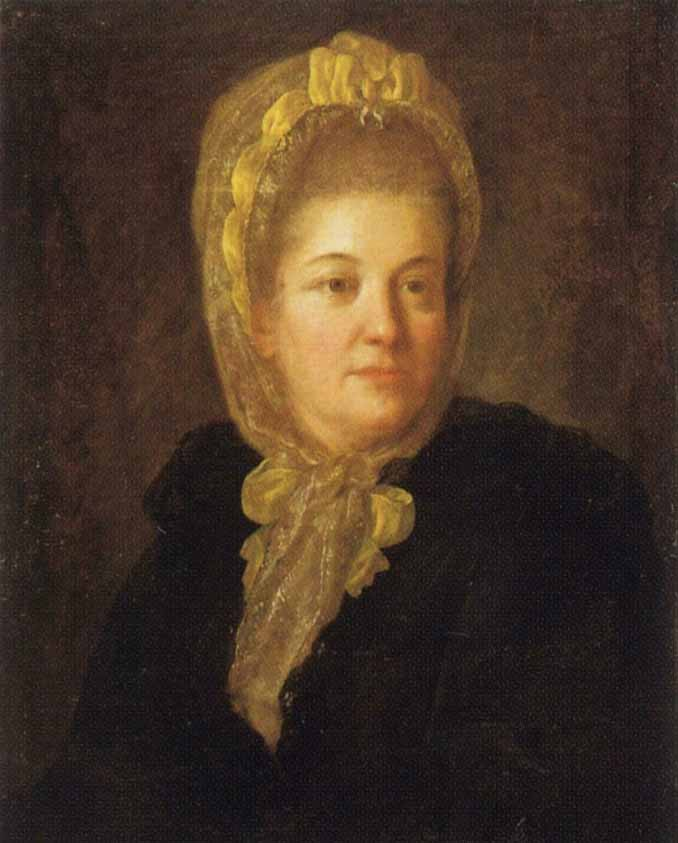 Воронцова Мария Артемьевна (урождённая Волынская) (1725 - 1792), дочь казненного в 1740 кабинет-министра А.П. Волынского и А.Л. Нарышкиной, родной племянницы царицы Натальи Кирилловны. После казни отца сослана в Сибирь и пострижена в монахини в енисейском Рождественском монастыре. По воцарении Елизаветы Петровны с нее в 1742 был снят монашеский обет и дано позволение вернуться в Москву, где она вышла замуж за графа И.И. Воронцова.